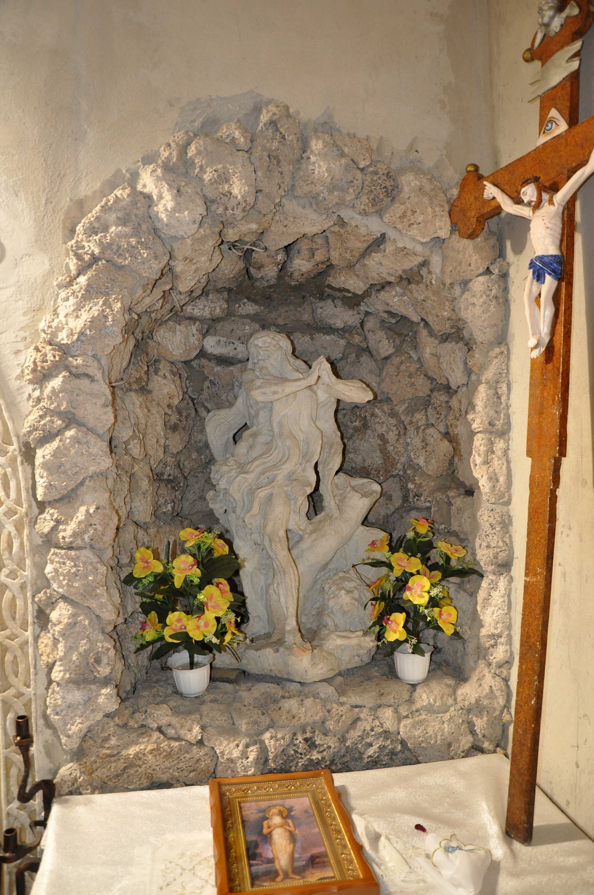 Скульптура св. Онуфрія, село Рукомиш, церква